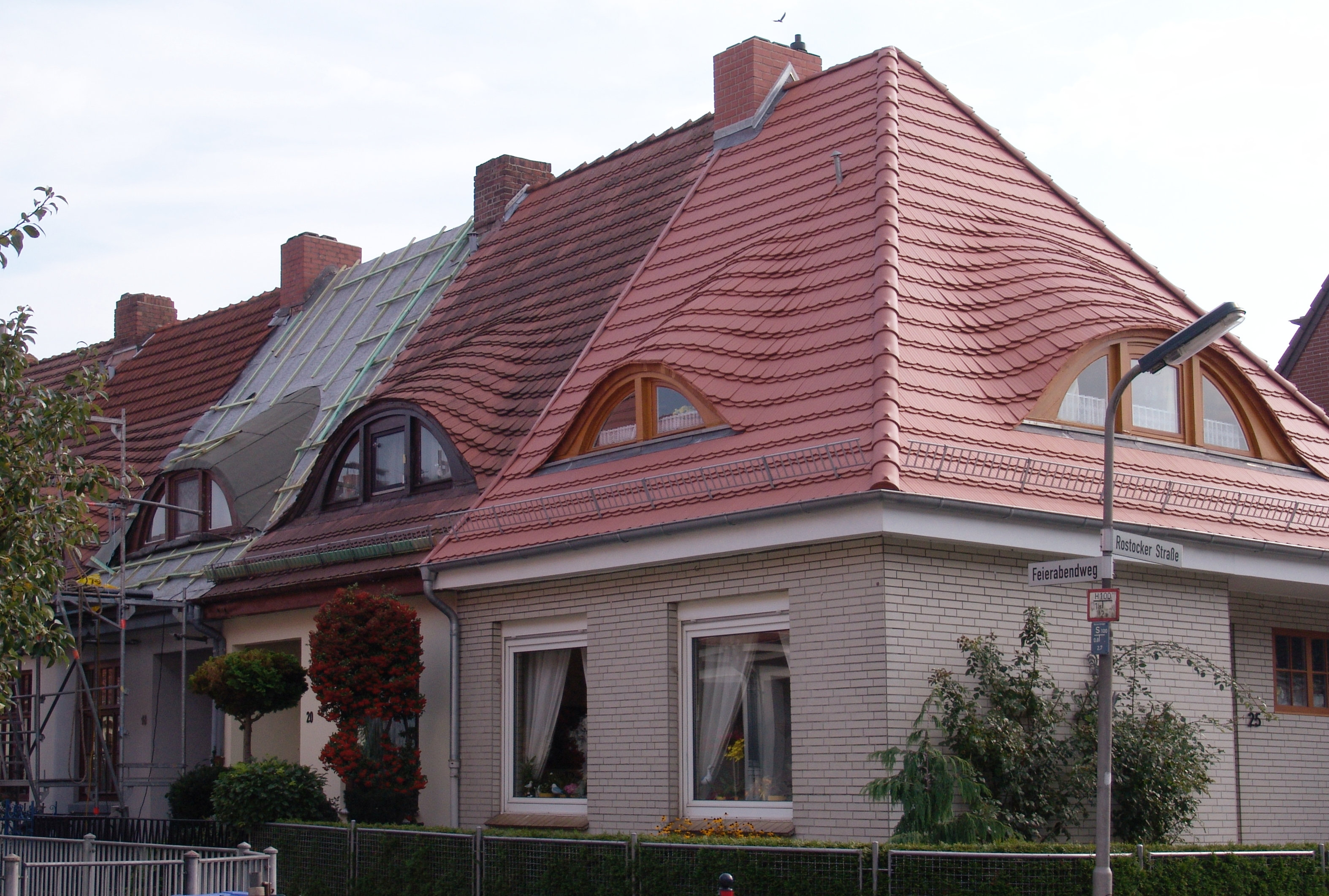 Wohnhaus in Bremen, Rostocker Straße 25.Das abgebildete Objekt ist ein geschütztes Kulturdenkmal in der Freien Hansestadt Bremen, mit der Nr. 1047 beim Landesamt für Denkmalpflege registriert.